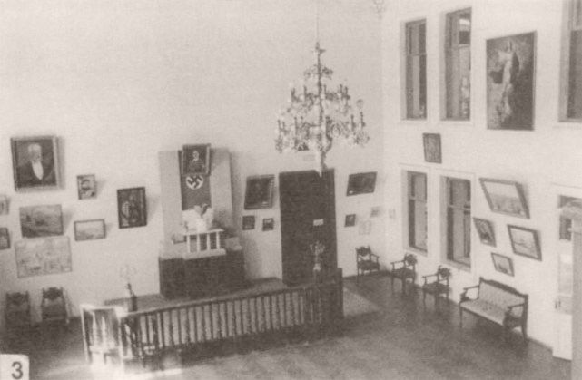 Таганрог. Фрагмент экспозиции краеведческого музея в годы оккупации, 1942-1943 гг.